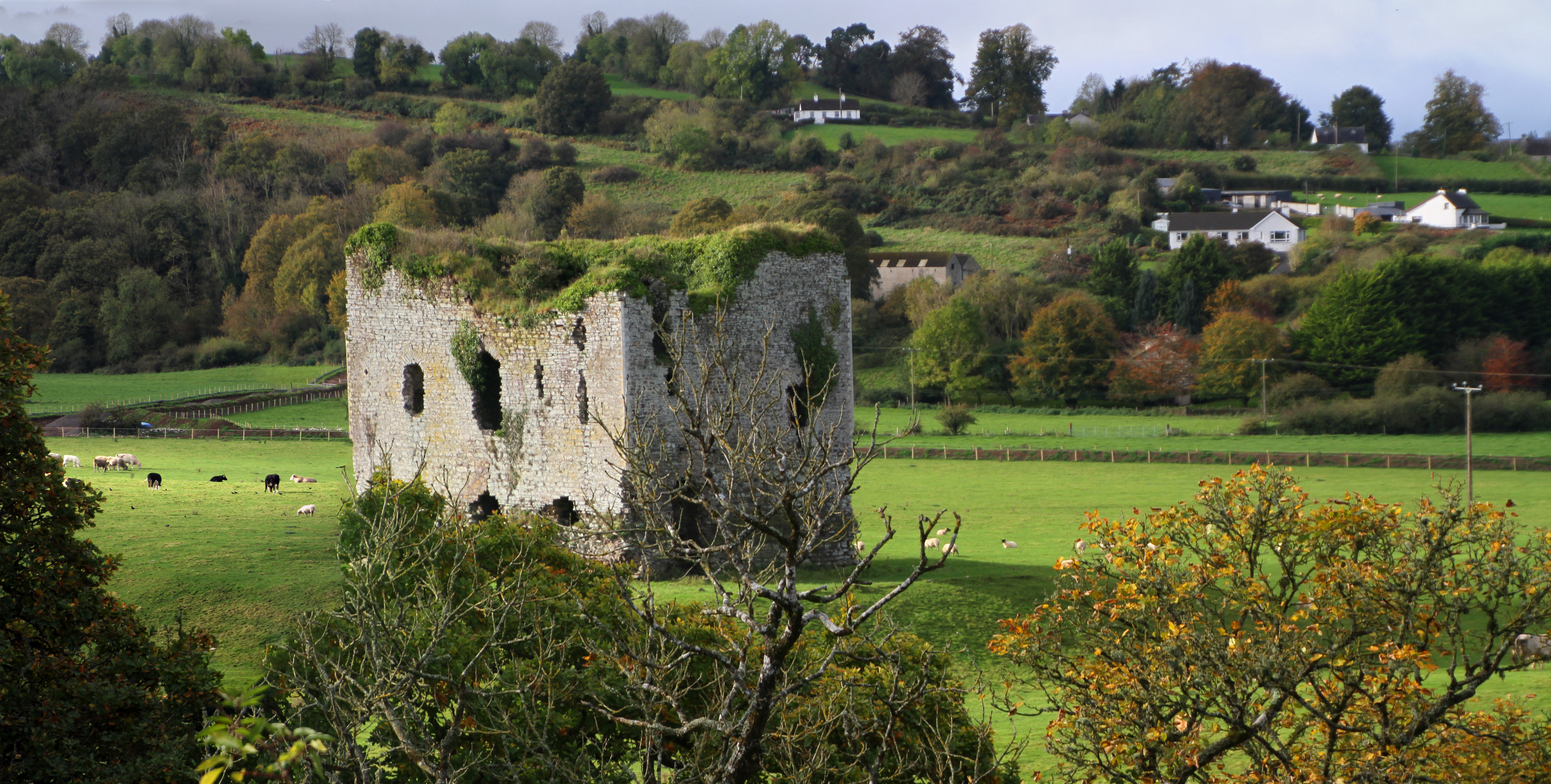 Grennan Castle, Thomastown, County Kilkenny